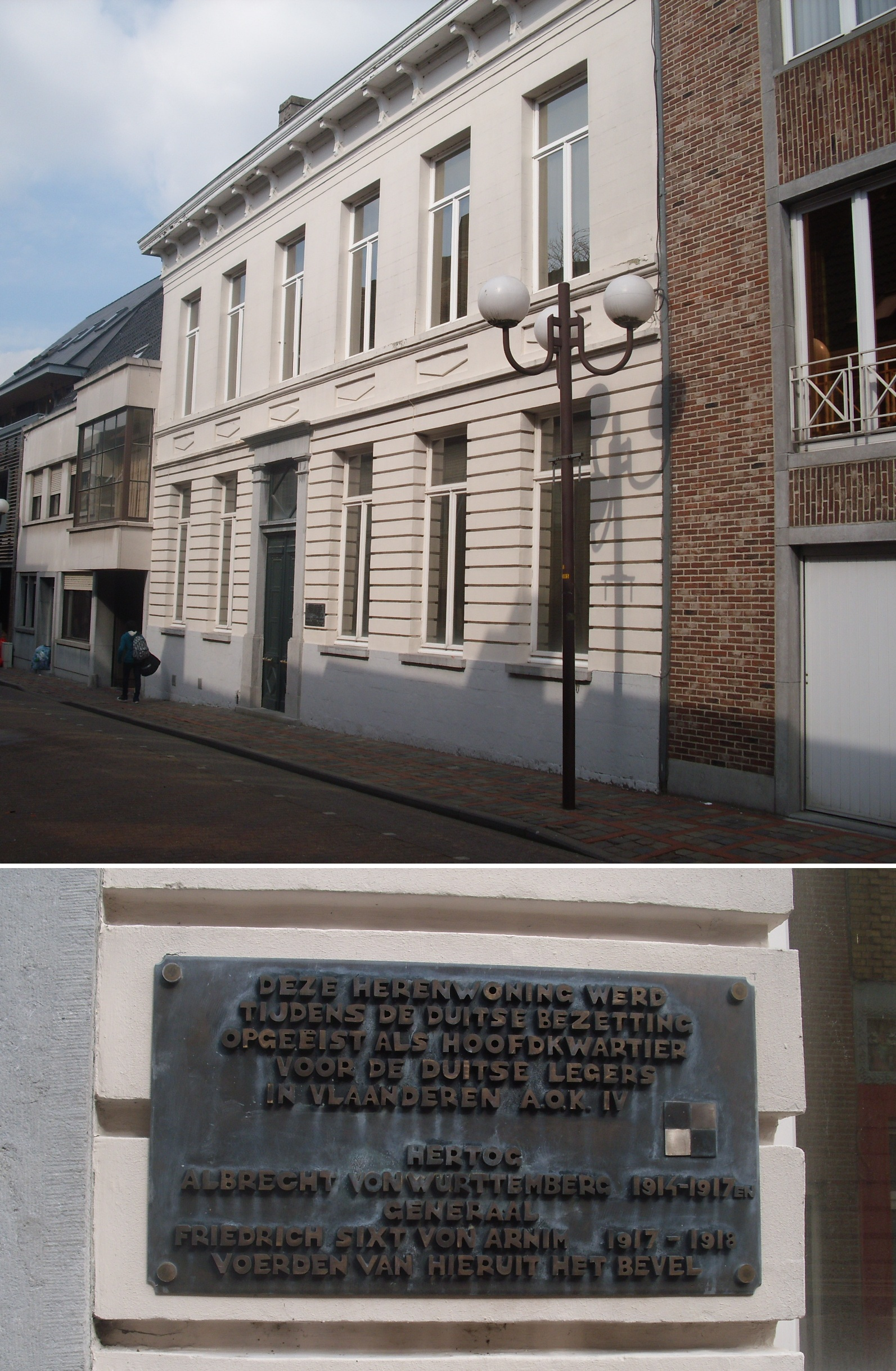 Huis van de latere burgemeester René Colle dat tijdens de Eerste Wereldoorlog dienst deed als woning van de opperbevelhebber van het Duitse Vierde Leger (na opeising). Hoogstraat 26 - Tielt - West-Vlaanderen - België